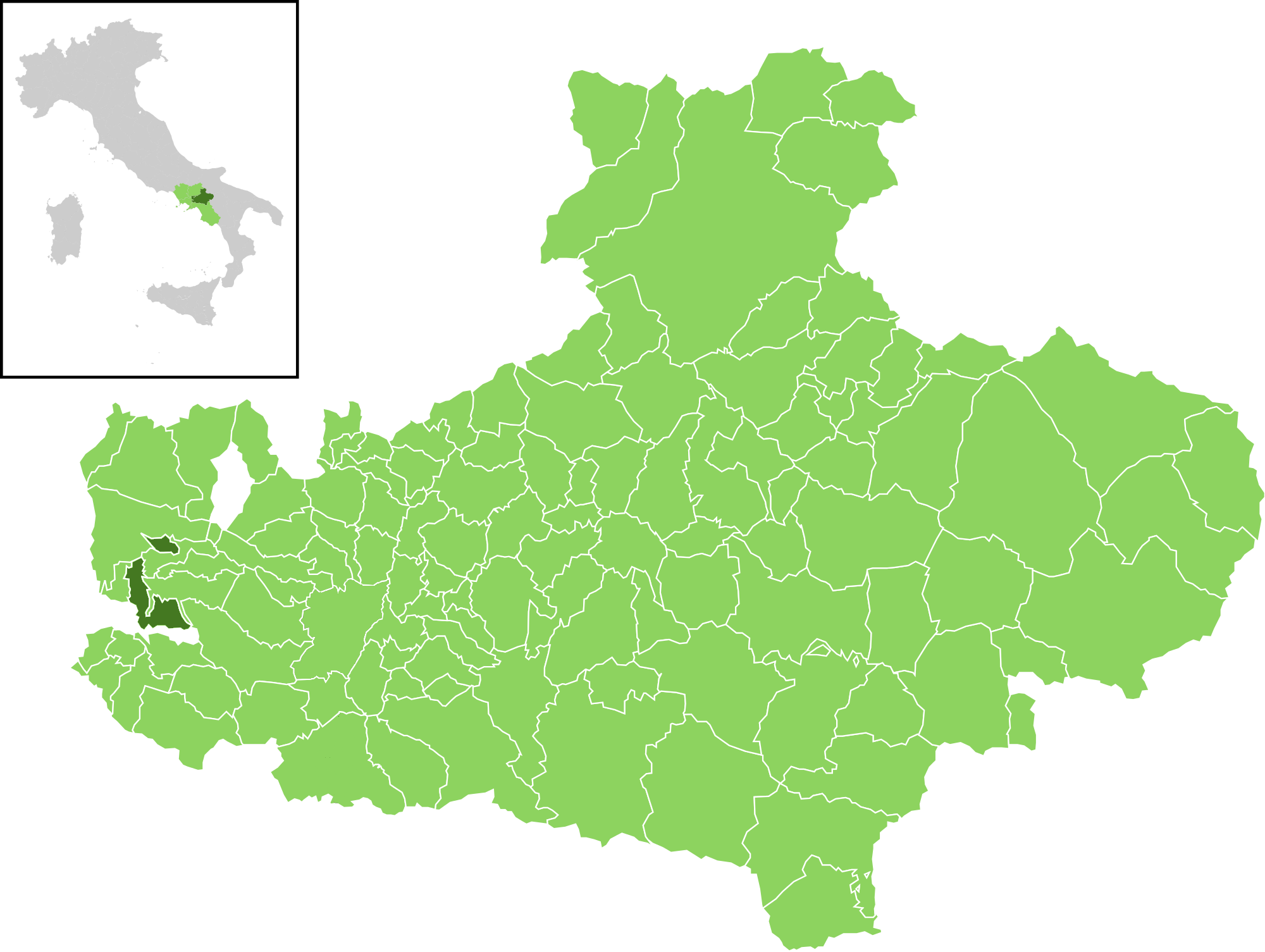 Il comune all'interno della provincia di Avellino